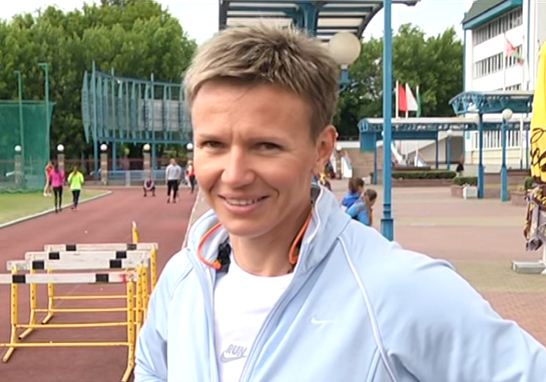 Юлія Несцярэнка